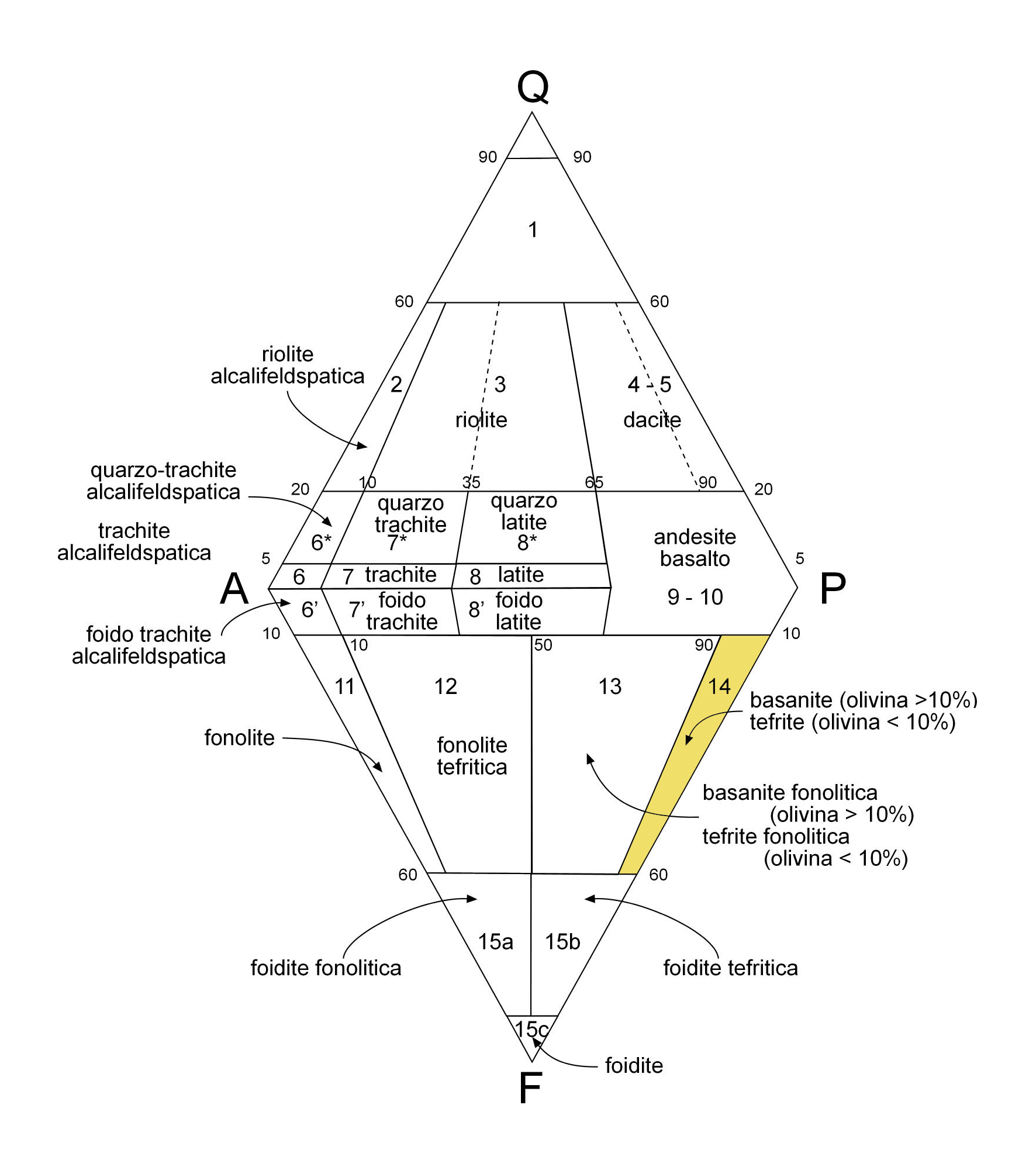 Posizione della tefrite nel doppio triangolo QAPF